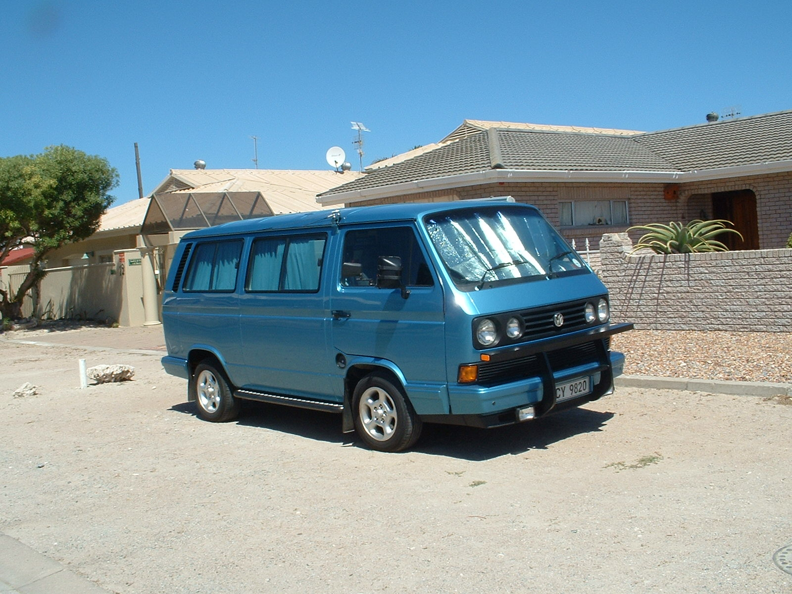 VW BUS T3 in Südafrika